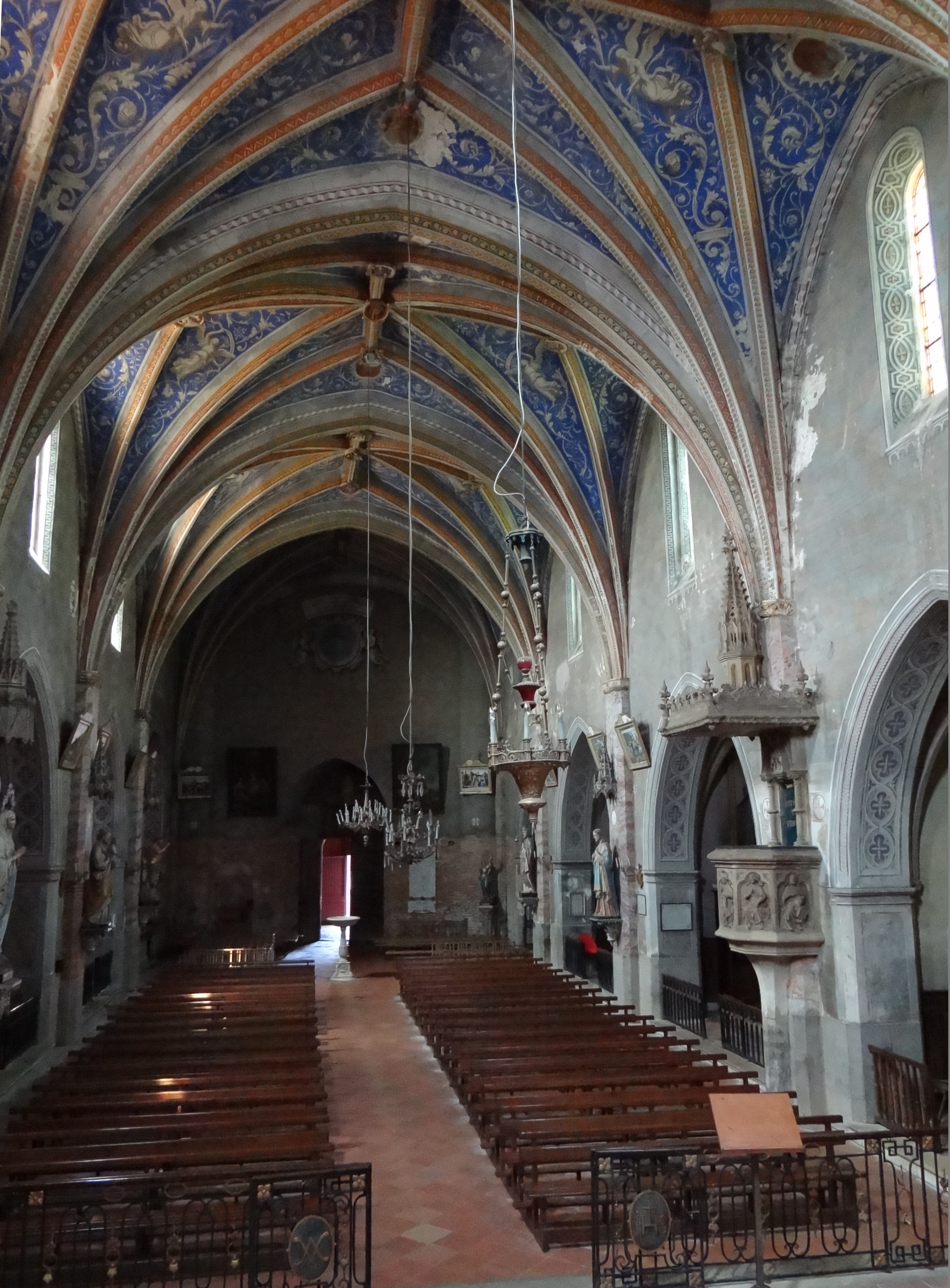 Nef de l'église, vue du chœur